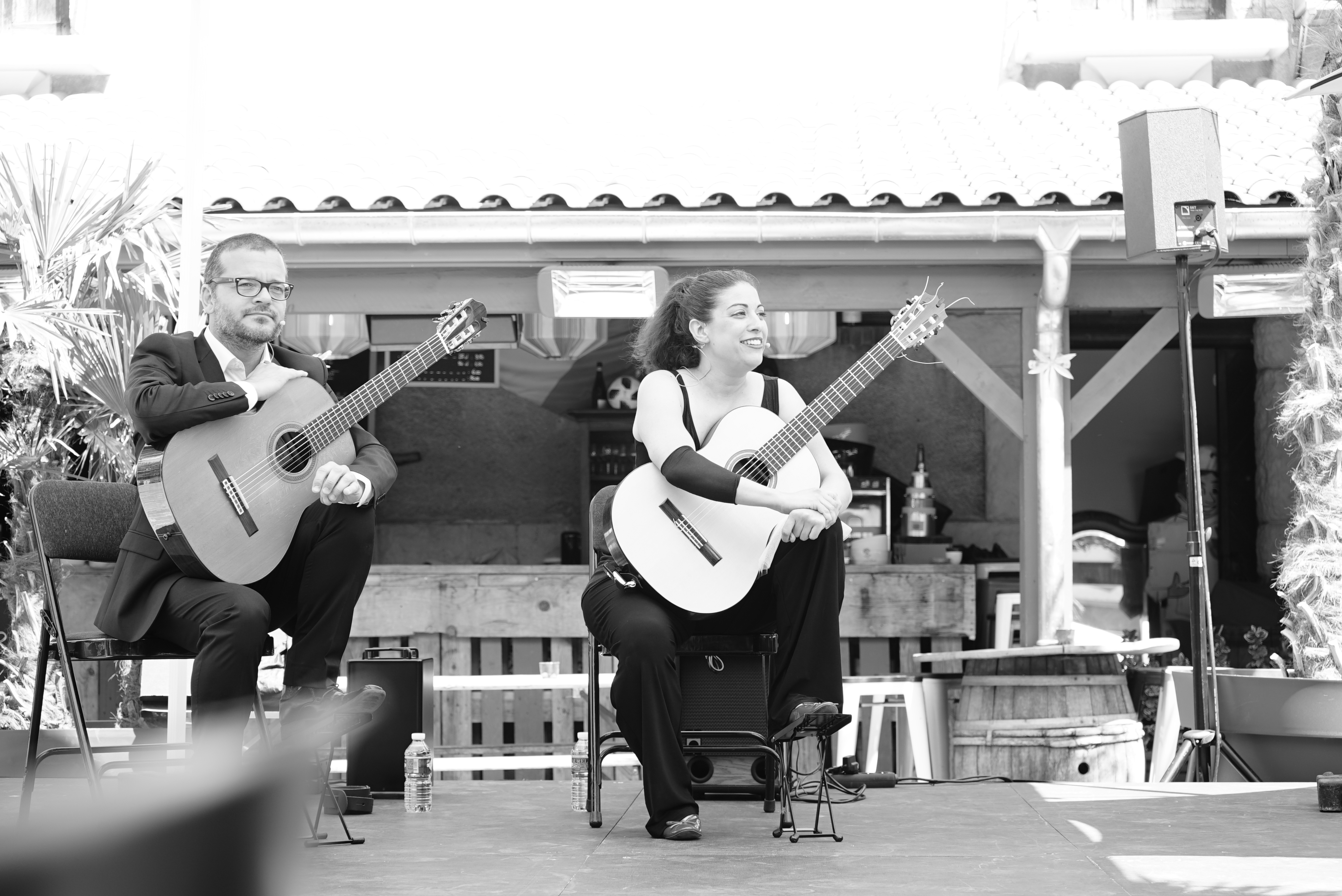 en cocncert au boulingrin.